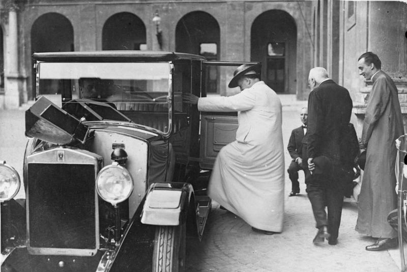 Der Papst fährt aus! Papst Pius XI. besteigt im Hof des Vatikans sein Reise-Auto zu einer Ausfahrt. Das Auto wurde ihm von der italienischen Regierung zum Geschenk gemacht. Information added by Wikimedia users.